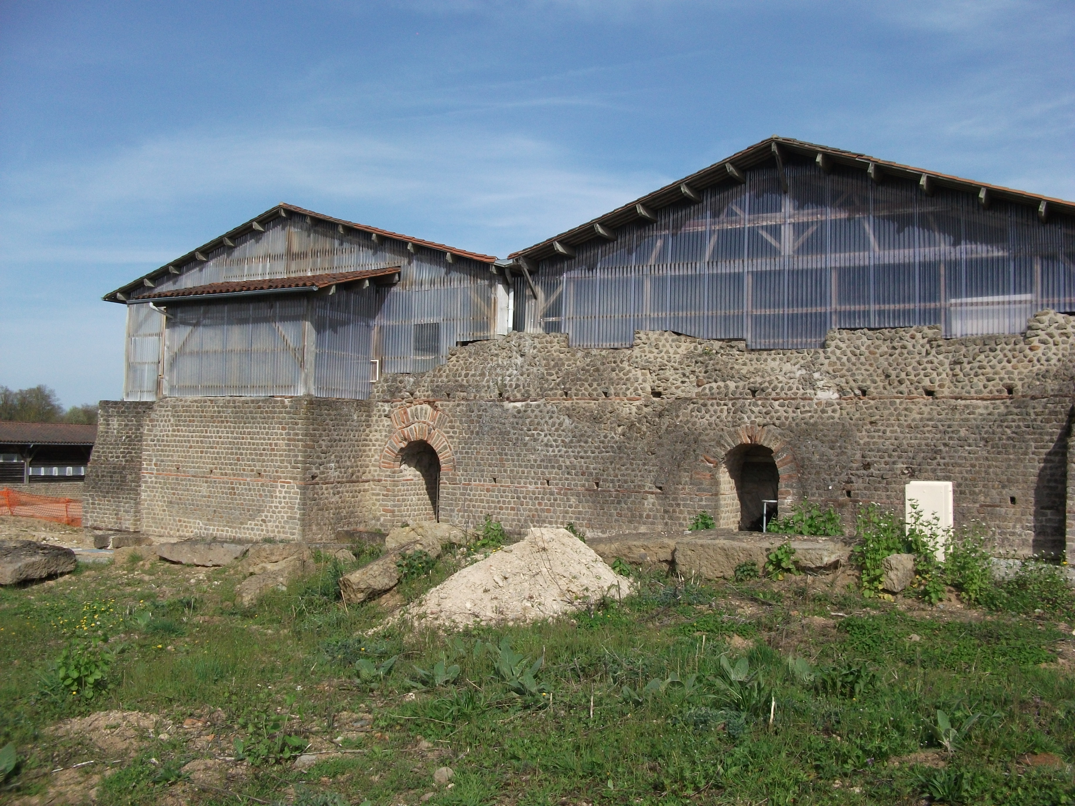 Cassinomagus, commune de Chassenon, Charente, France S-O. Une partie de la façade ouest de l'ensemble thermal : caldarium à gauche et sudatio à droite (voir plan dans Hourcade et al. 2011, "À l’ouest d’Augustoritum, du nouveau sur Cassinomagus (Chassenon, Charente)", paragr. 16, fig. 6). Thermes classés MH. .